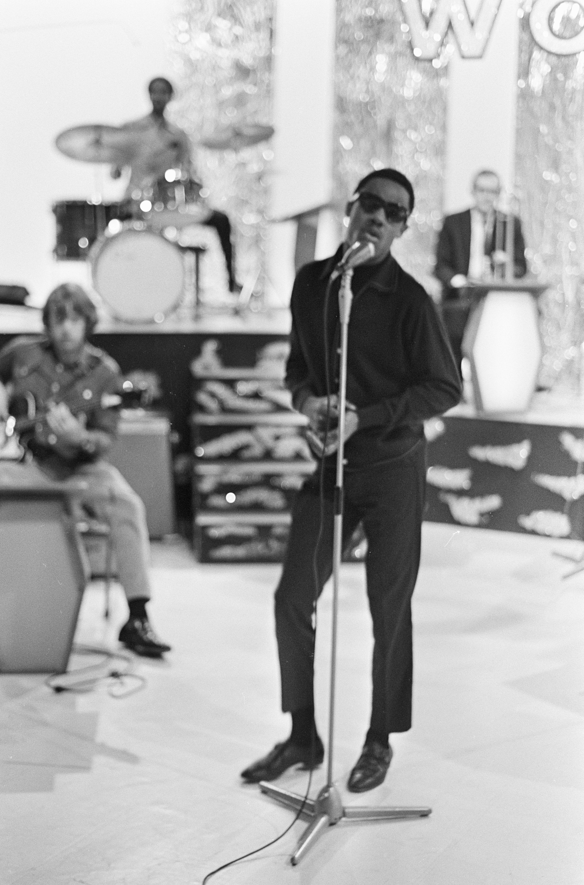 Collectie / Archief : Fotocollectie Anefo Reportage / Serie : [ onbekend ] Beschrijving : Stevie Wonder (zanger) voor TROS-TV. Stevie Wonder tijdens repetitie Datum : 30 oktober 1967 Trefwoorden : repetities, zangers Persoonsnaam : Stevie Wonder Instellingsnaam : TROS Fotograaf : Nijs, Jac. de / Anefo Auteursrechthebbende : Nationaal Archief Materiaalsoort : Negatief (zwart/wit) Nummer archiefinventaris : bekijk toegang 2.24.01.05 Bestanddeelnummer : 920-8213